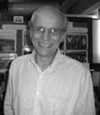 Antônio Jacó Brand